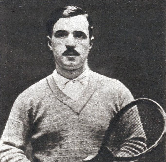 Pierre Etchebaster en 1928.